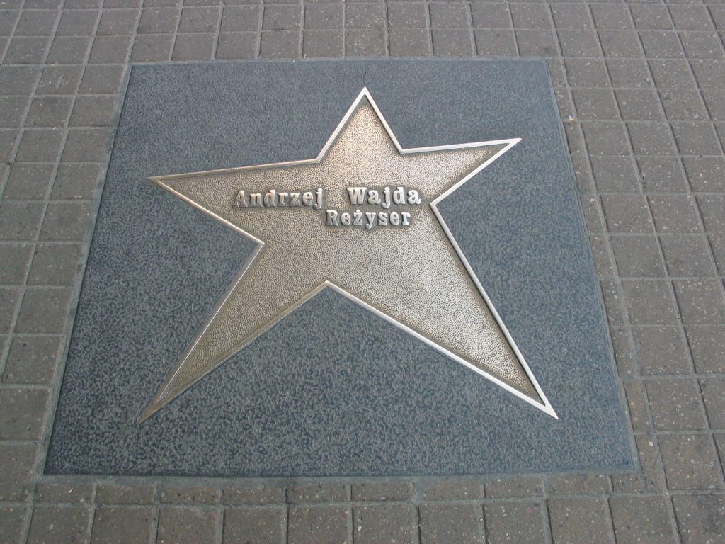 Łódź Walk of Fame - Andrzej Wajda